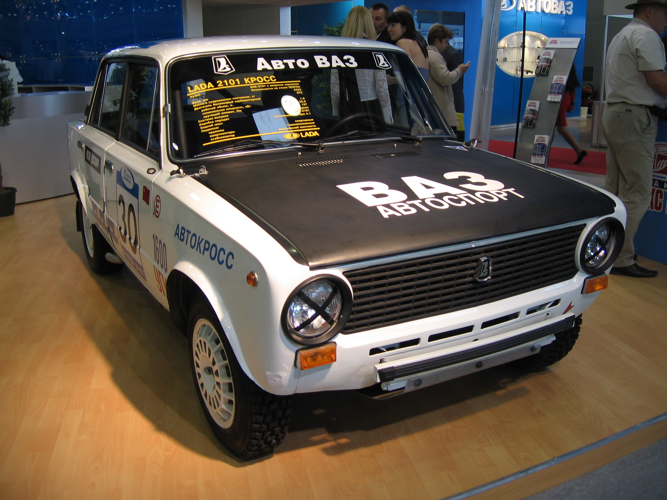 vaz 2101 cross